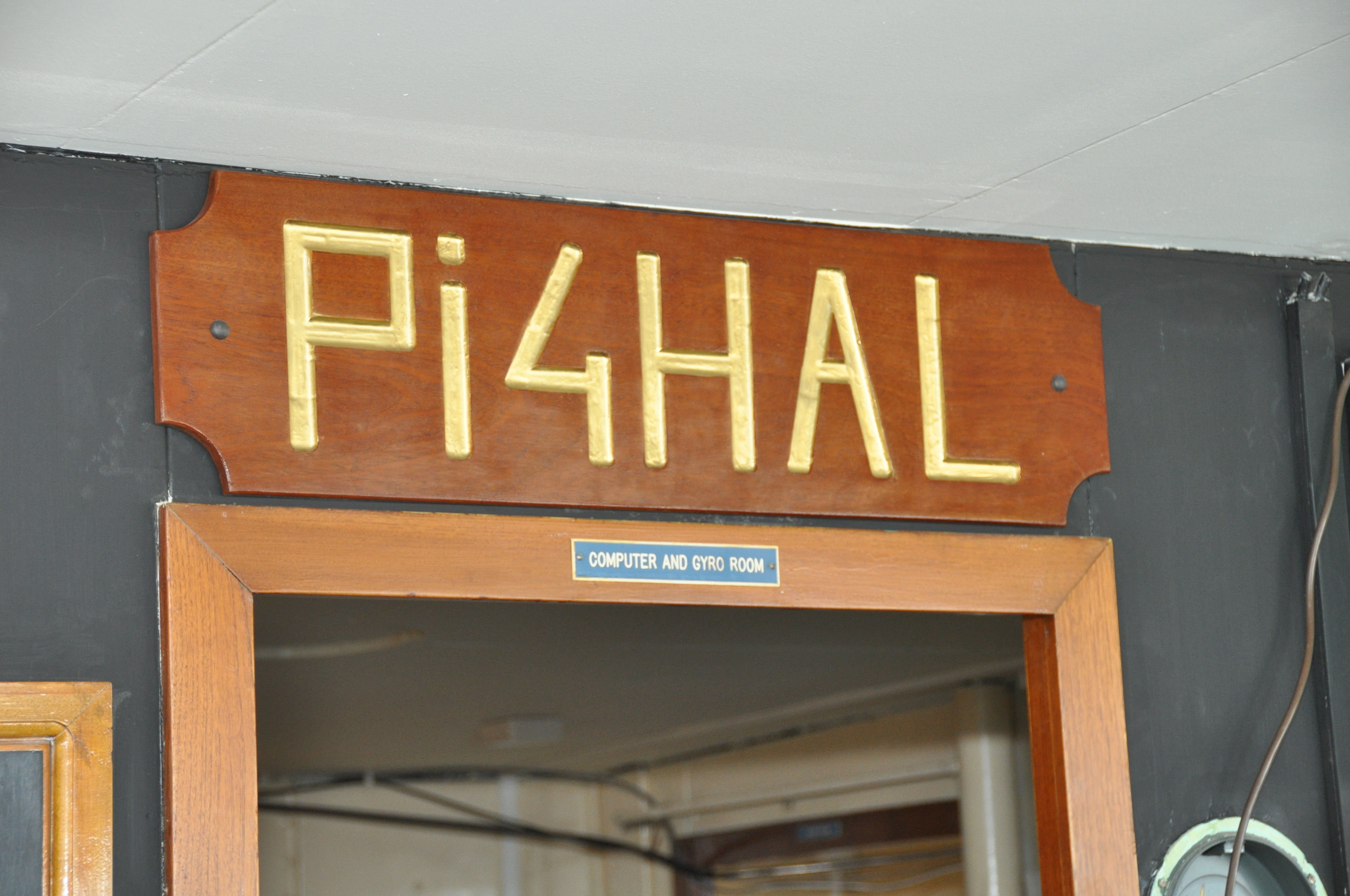 De ROTTERDAM op haar ligplaats in de Maashaven te Rotterdam